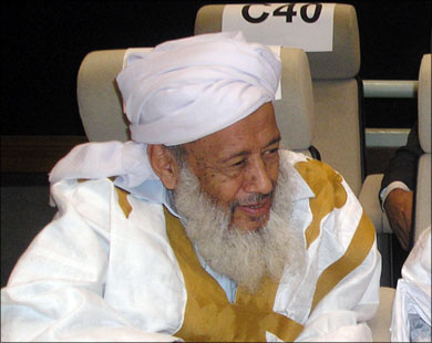 الشيخ